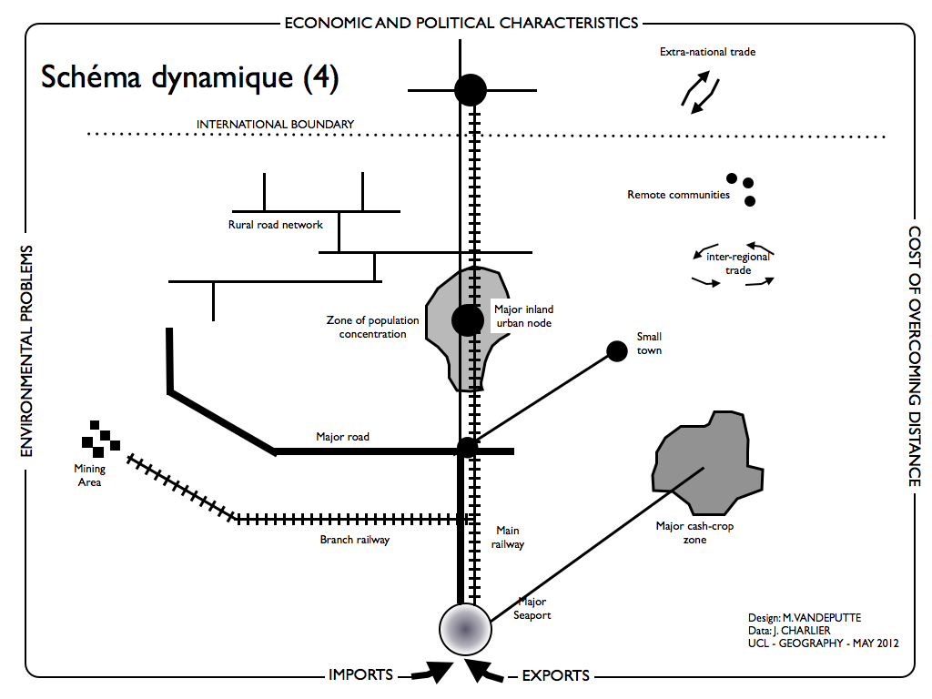 Schéma de développement d'un réseau de transport en Afrique Centrale